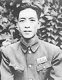 1949年，耿飚在山西